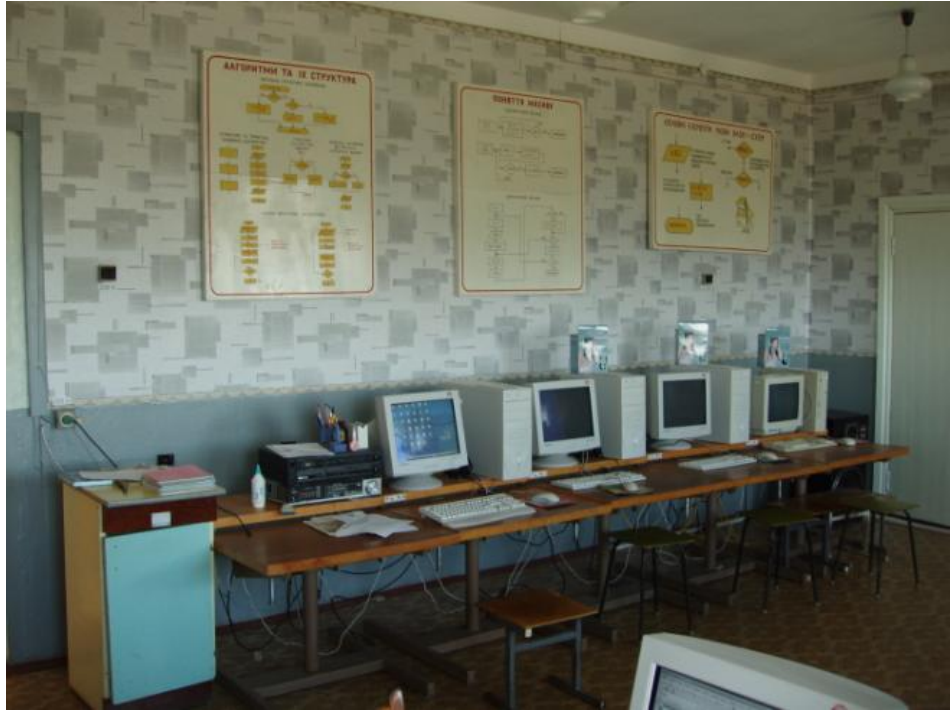 Клас сучасних технологій.